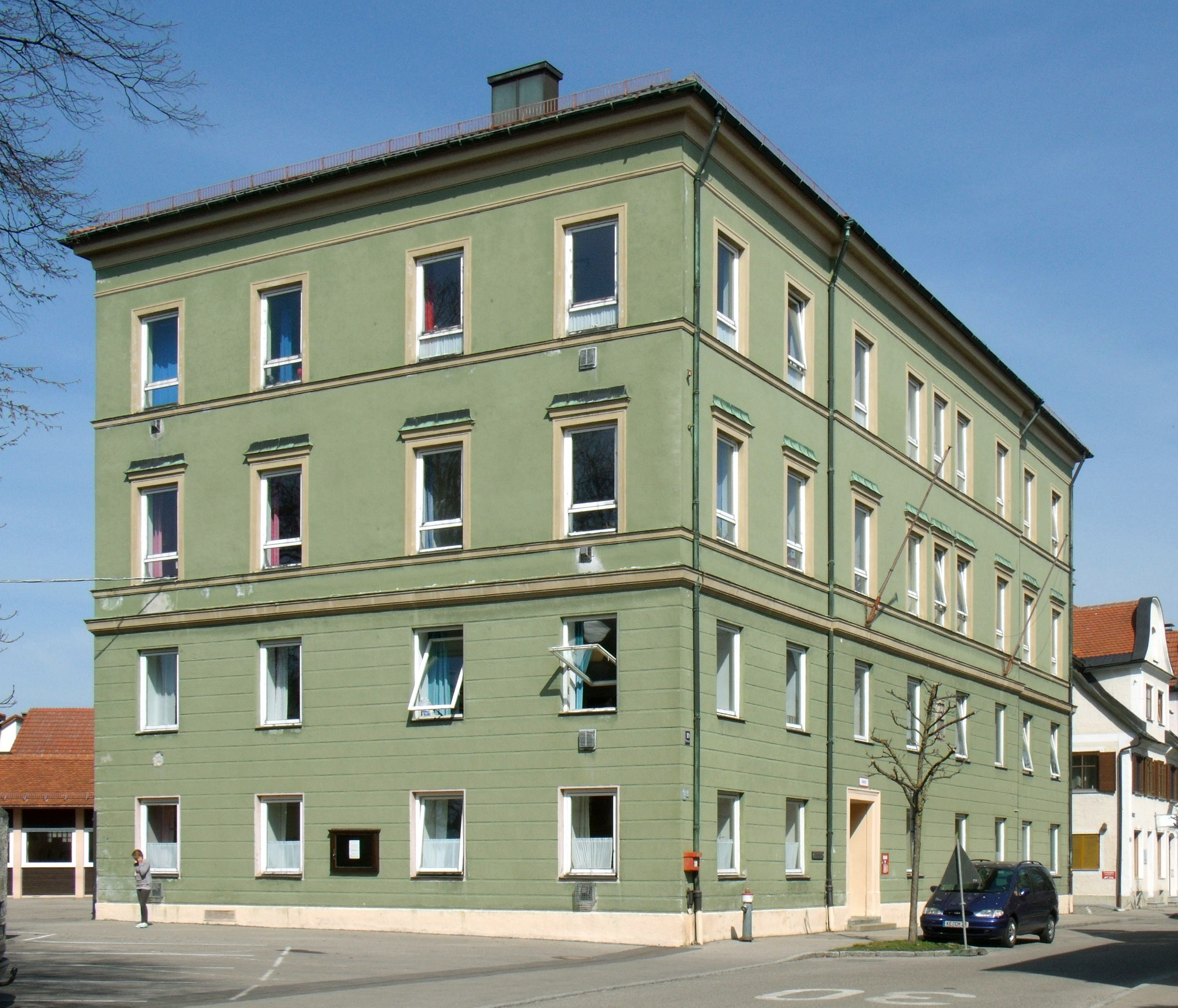 Früher Humanistisches Gymnasium in Kempten (Allgäu)